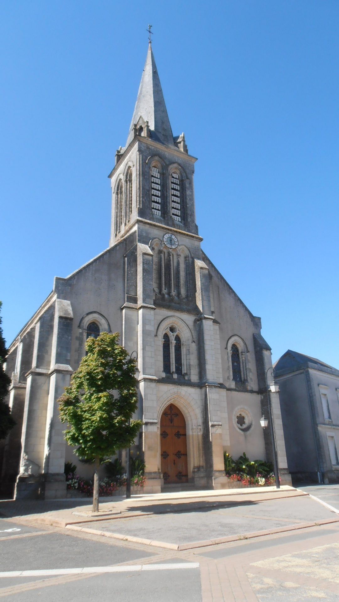 L'église de Botz-en-Mauges (Maine-et-Loire, France).